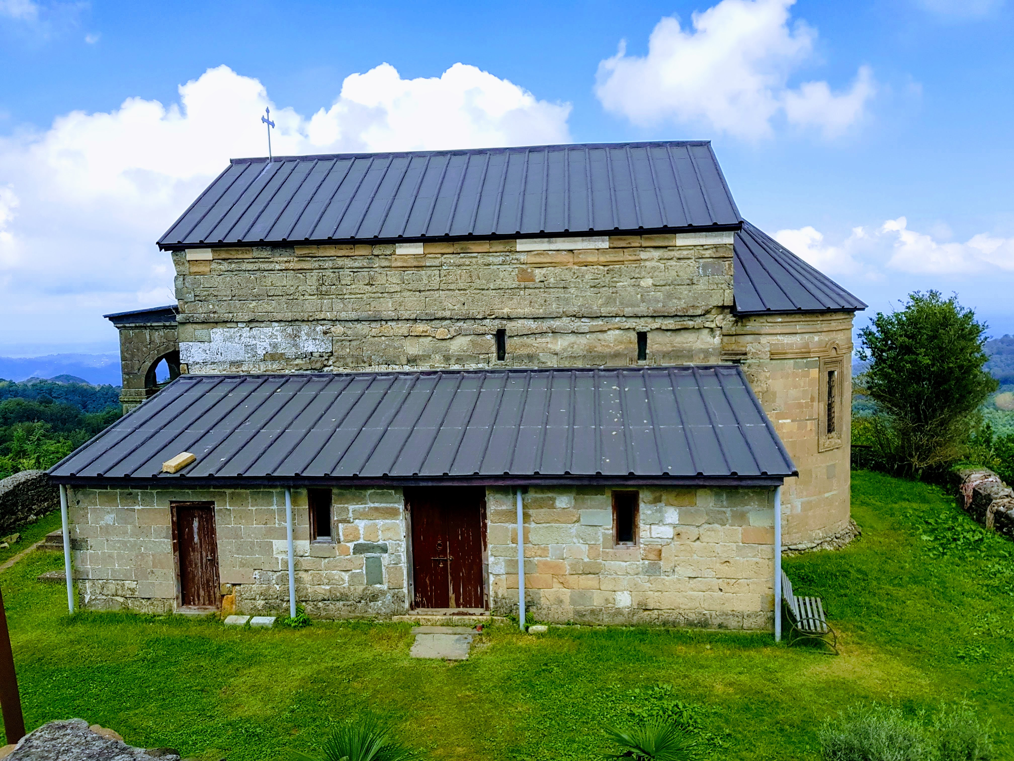 ჯუმათის ეკლესია